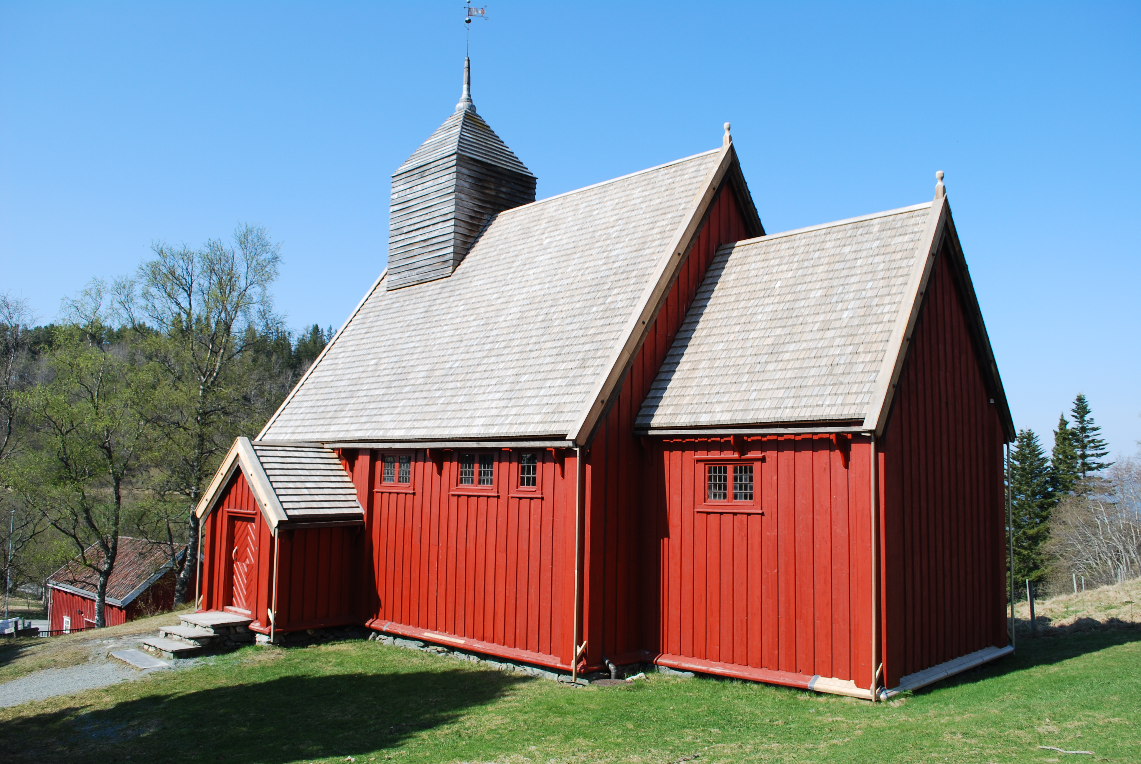 Lo kirke på Trøndelag Folkemuseum ved Sverresborg i Trondheim.